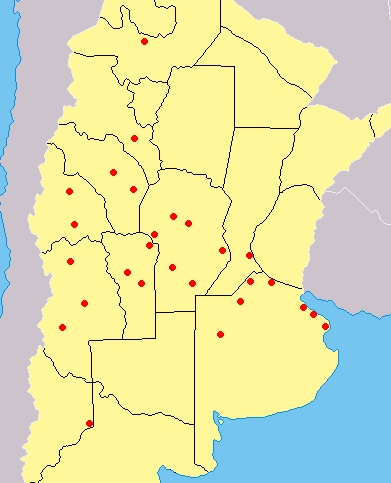 Nevadas en Argentina 09-07-07